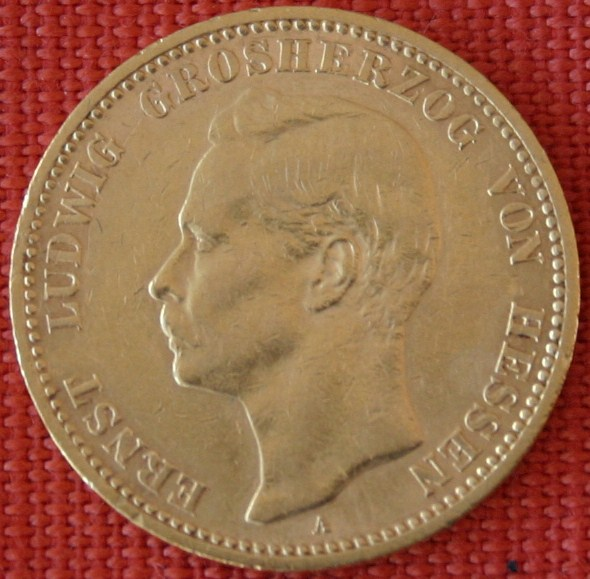 20 Mark mit Konterfei Ernst Ludwig aus dem Jahr 1900